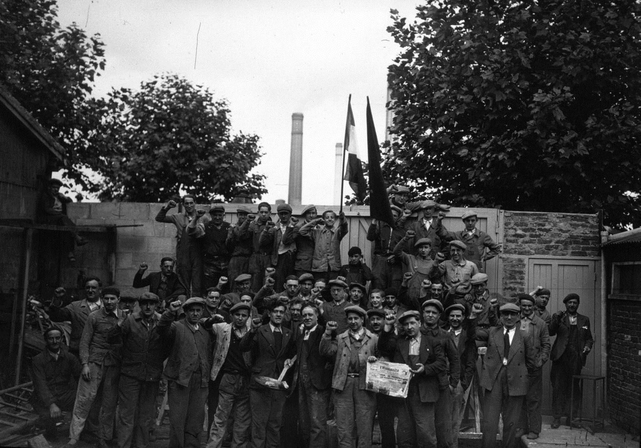 Grève de la métallurgie : occupation d'une usine de la banlieue parisienne, 1936. Photographie de presse / Agence Meurisse.